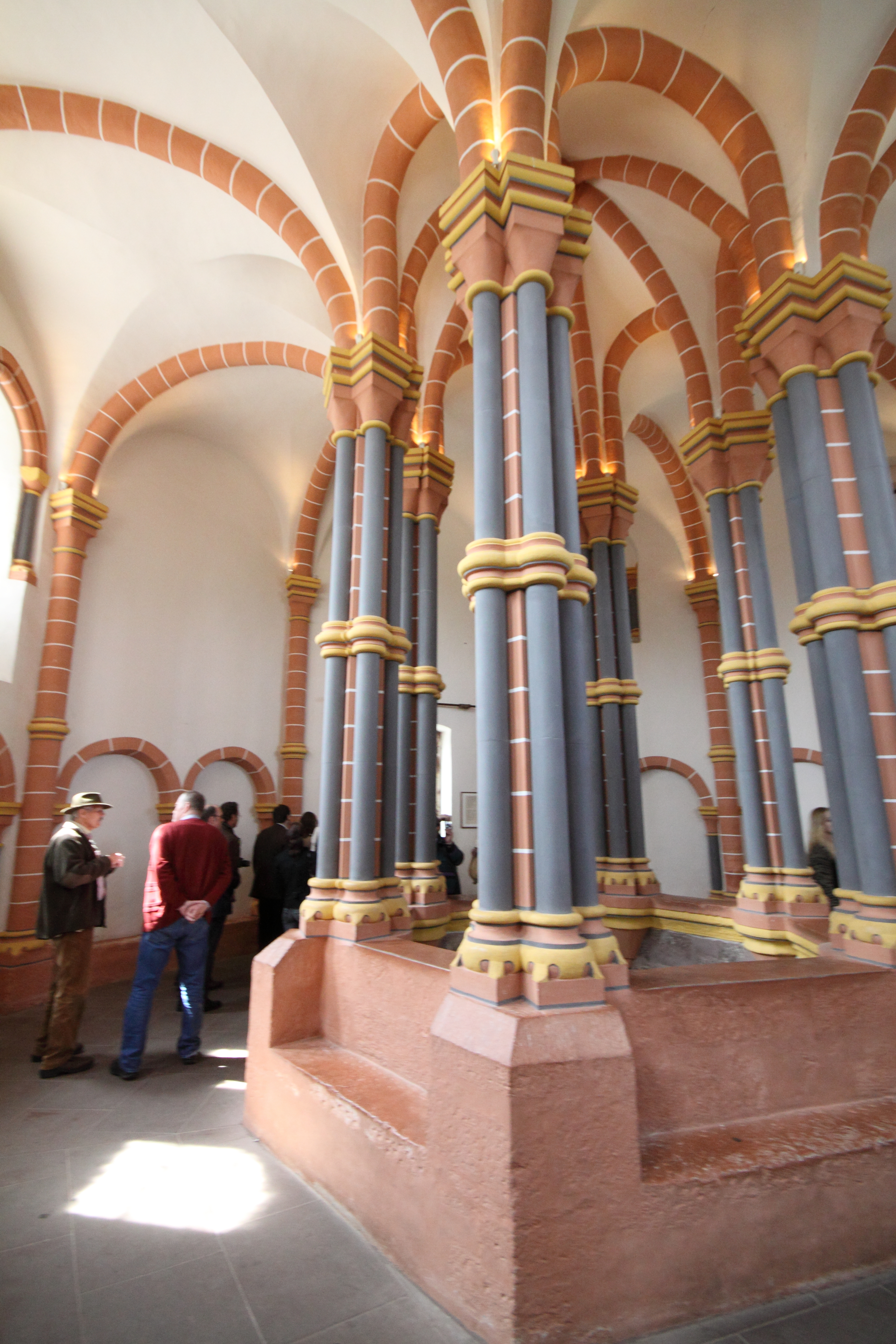 Vianden Doppelkapelle, Blick durch die Fußbodenöffnung zum Obergeschoss.